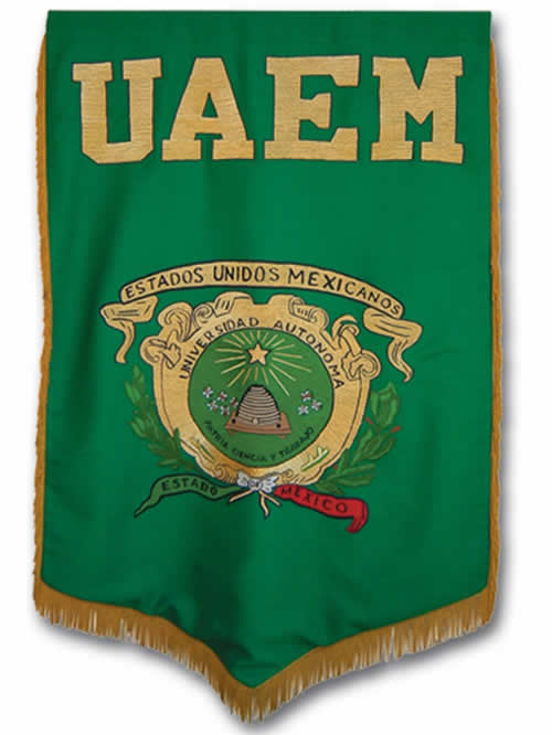 El estandarte de la Universidad Autónoma del Estado de México